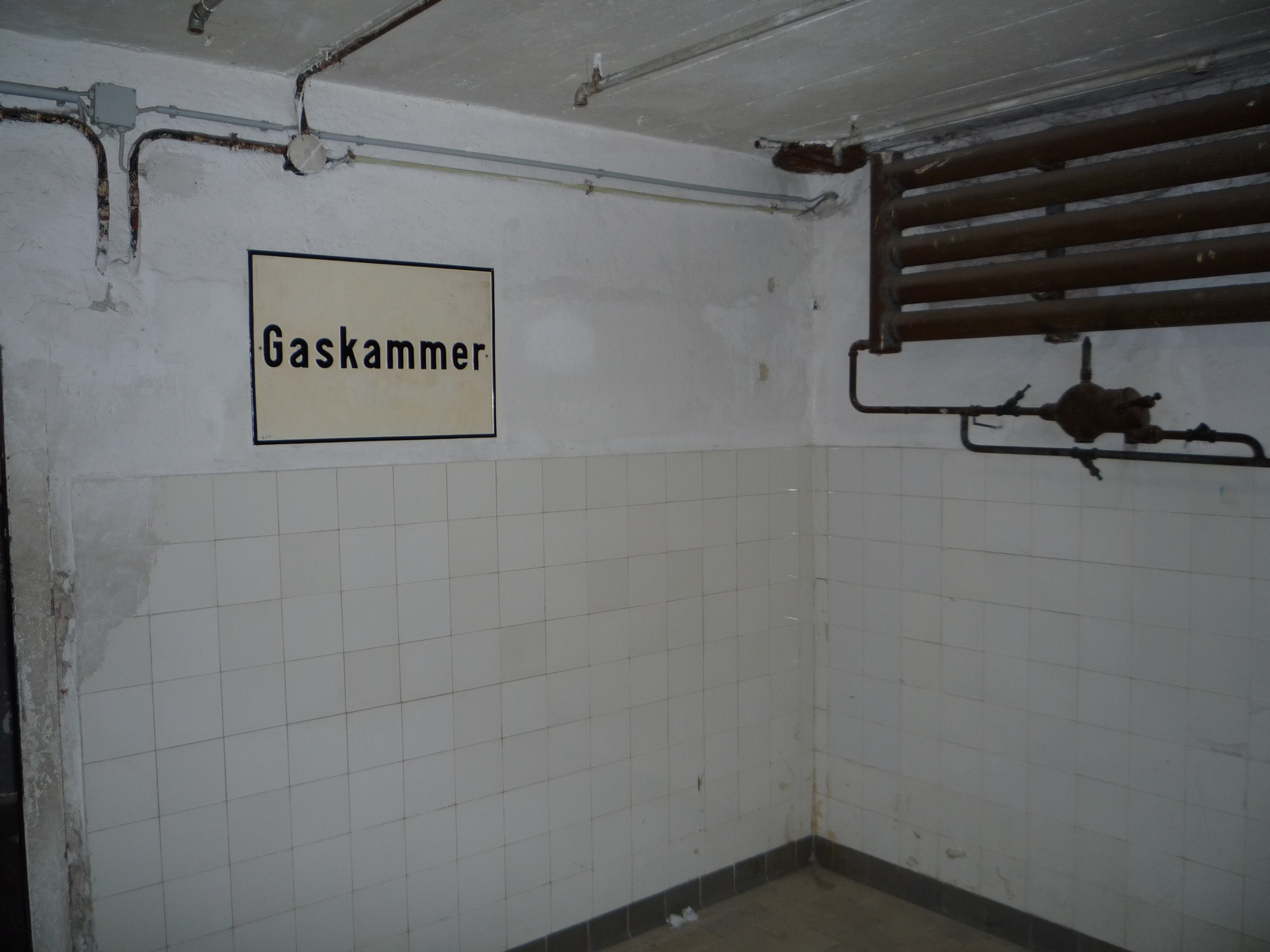 Le camp de concentration de Mauthausen n'était pas un camp d'extermination, bien que des exécutions s'y déroulaient aussi. De ce fait, la chambre à gaz du camp ne mesurait qu'environ 5 m2. Cammouflée en salle de douche, la chambre à gaz était installée au sous-sol de l'infirmerie. D'après les informations du commandant SS martin Roth qui commandait les opérations de crémation, les premières victimes ont été asphyxiées au gaz Zyklon B au printemps 1942. le dernier massacre au gaz eu lieu le 28 avril 1945. Le 29 avril 1945 les installations techniques (le réservoir à gaz, les conduites, le ventilateur, etc) furent enlevées et la chambre à gaz mise dans l'état actuel.